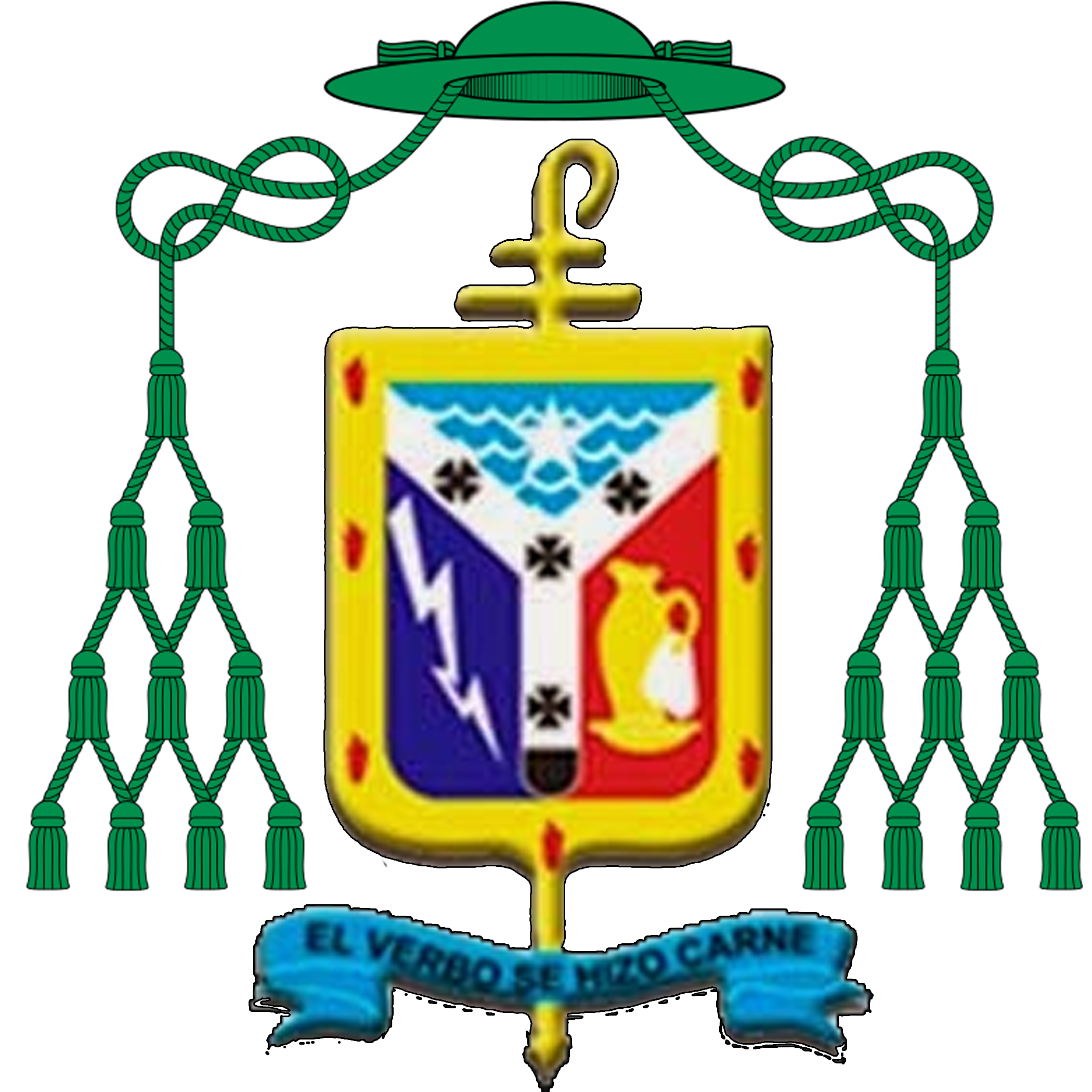 Escudo episcopal de Monseñor Ubaldo Santana Sequera